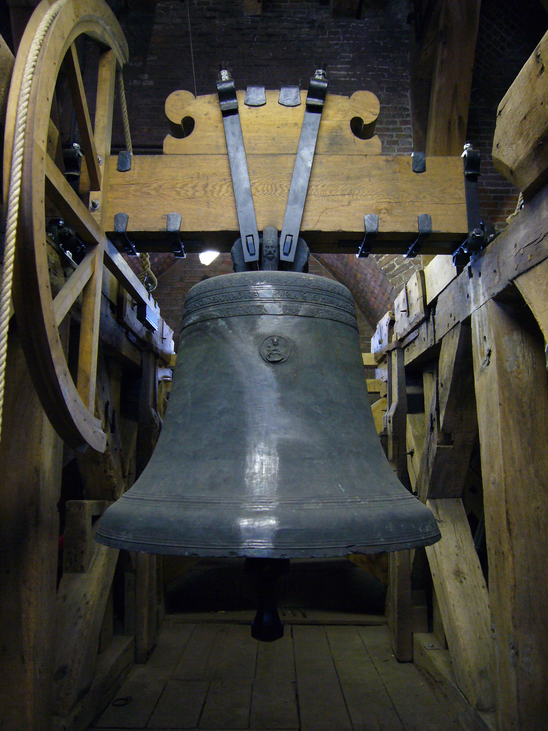 Grote Mariaklok (1534) in de Buurkerktoren